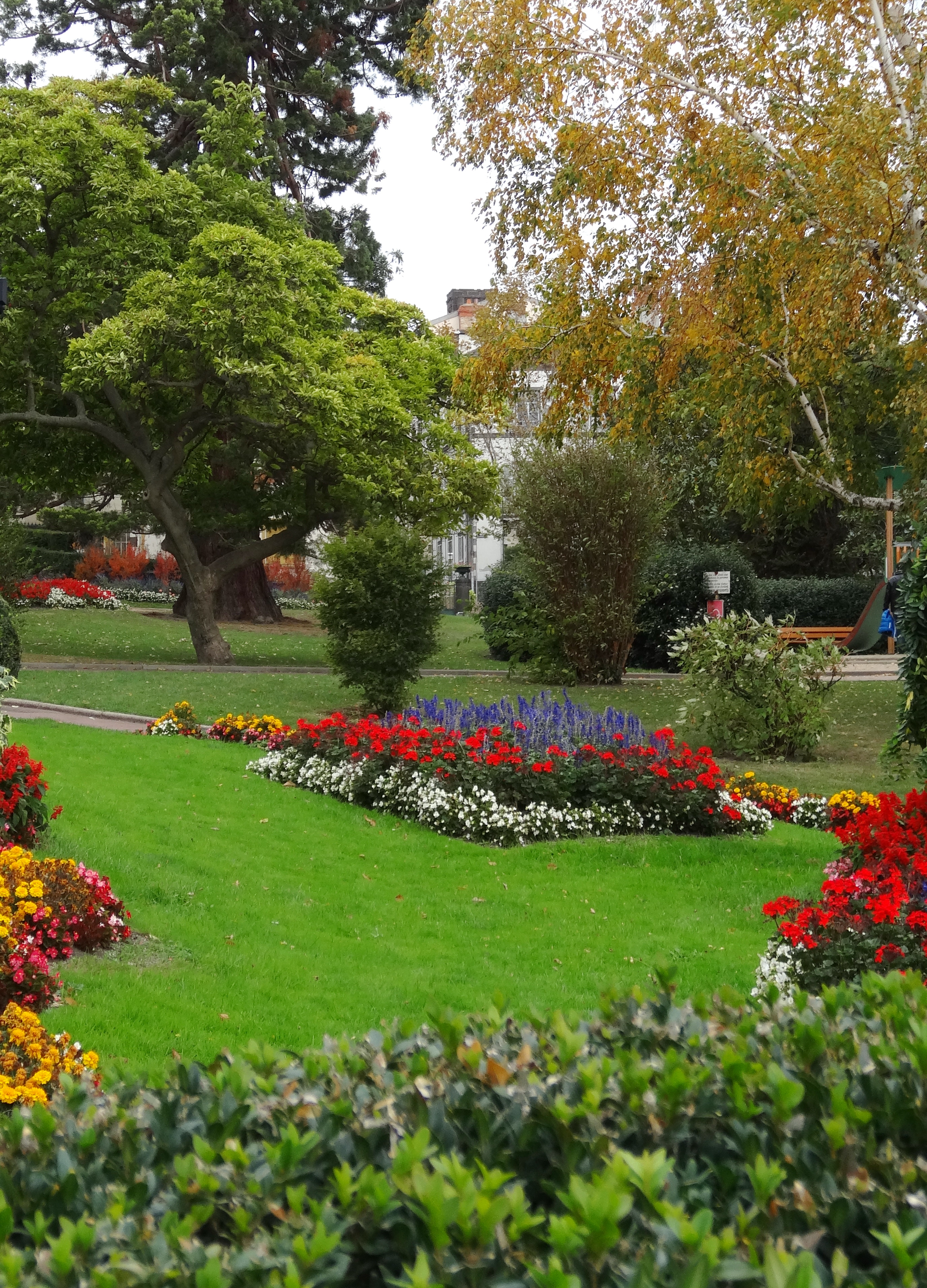 Jardin Lecoq - Clermont-Ferrand